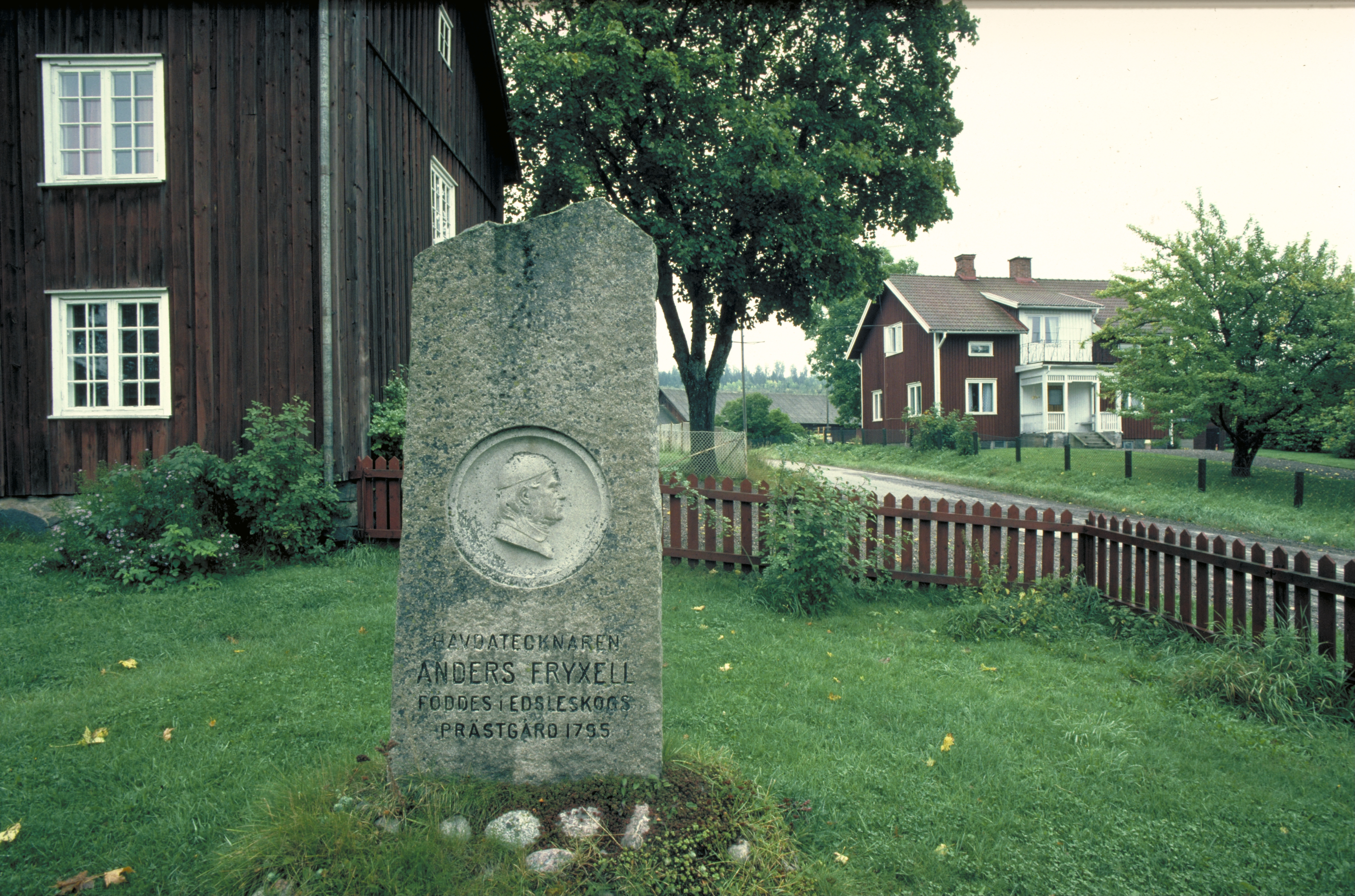 Historikern Anders Fryxells födelseplats och minnessten. Bilden troligen från omkring 1980. Motiv: Edsleskog 27:1 Kategori: Minnesmärke Historikern Anders Fryxells födelseplats och minnessten. Bilden troligen från omkring 1980. Edsleskog 27:1.